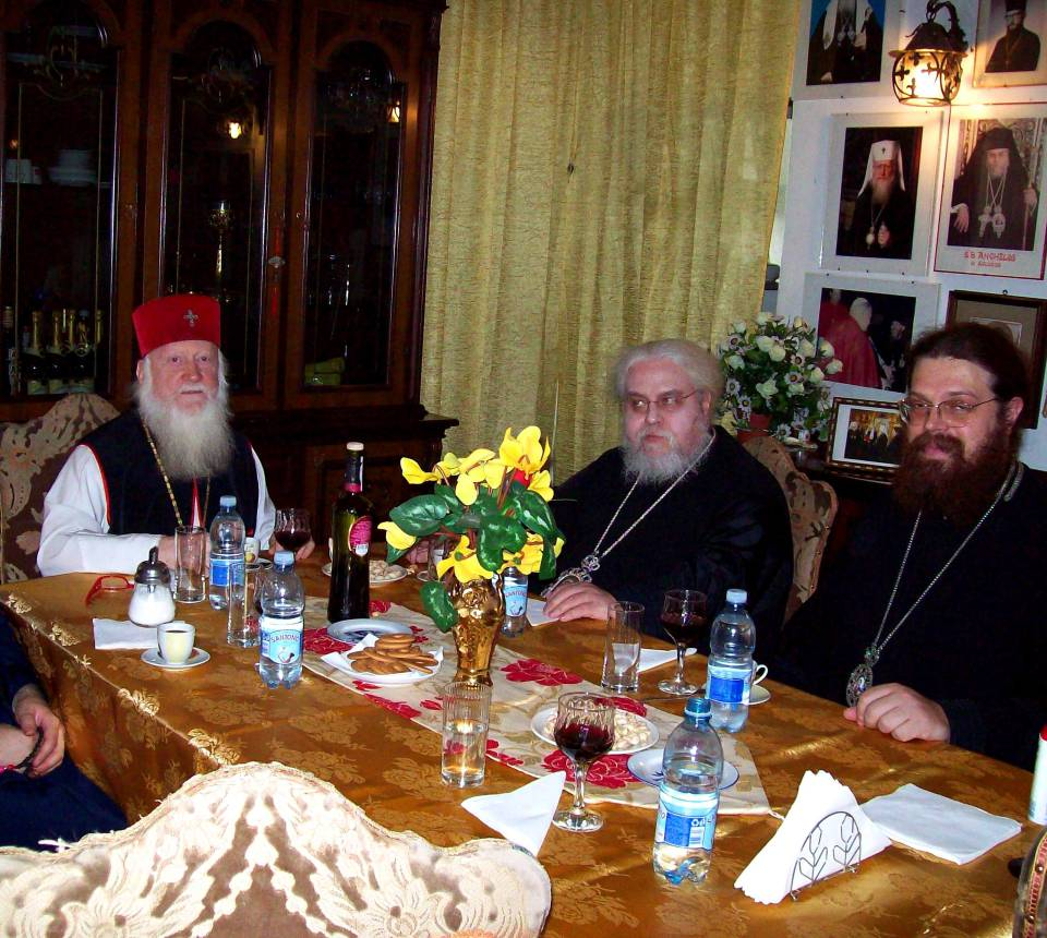 Mitropolit Evloghios, Anghelos , Bishop Porfirios and Avondios